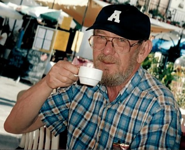 תמונתו של משה צ'אוסקי